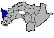 中華民國嘉義縣東石鄉，KJ (talk)繪製。